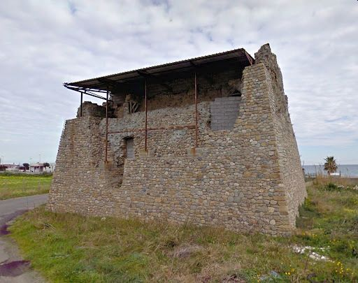 Torre Vicereale detta "Torre Nuova" o "Torre Nova", per distinguerla dalla "Torre Vecchia" posta a Punta Alice, si trova a sud dell'abitato di Cirò Marina a non molta distanza dal fiume Lipuda